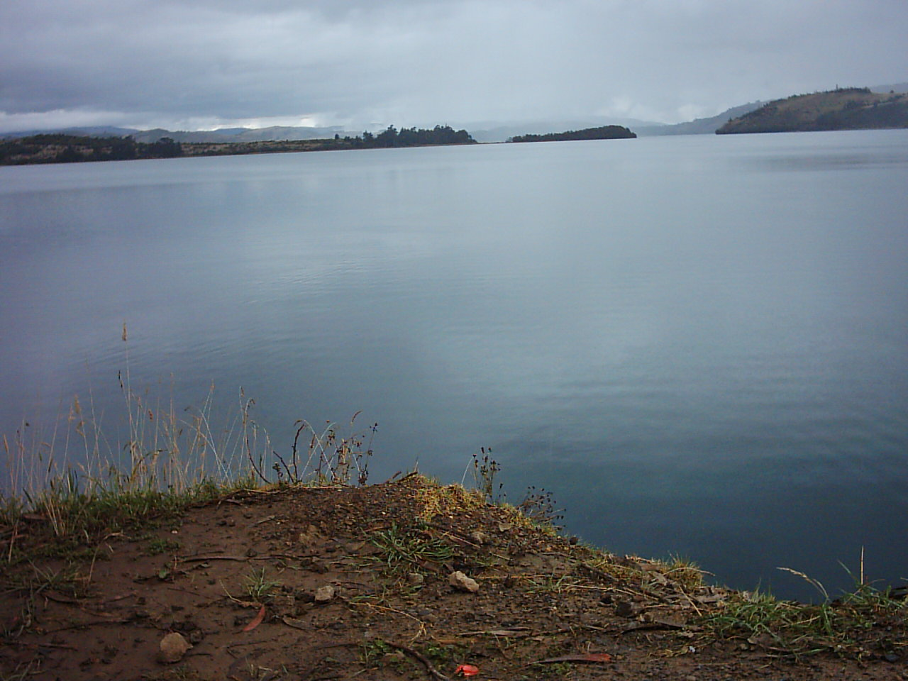 Laguna de Tota en Boyacá, Colombia (Tota Lake)